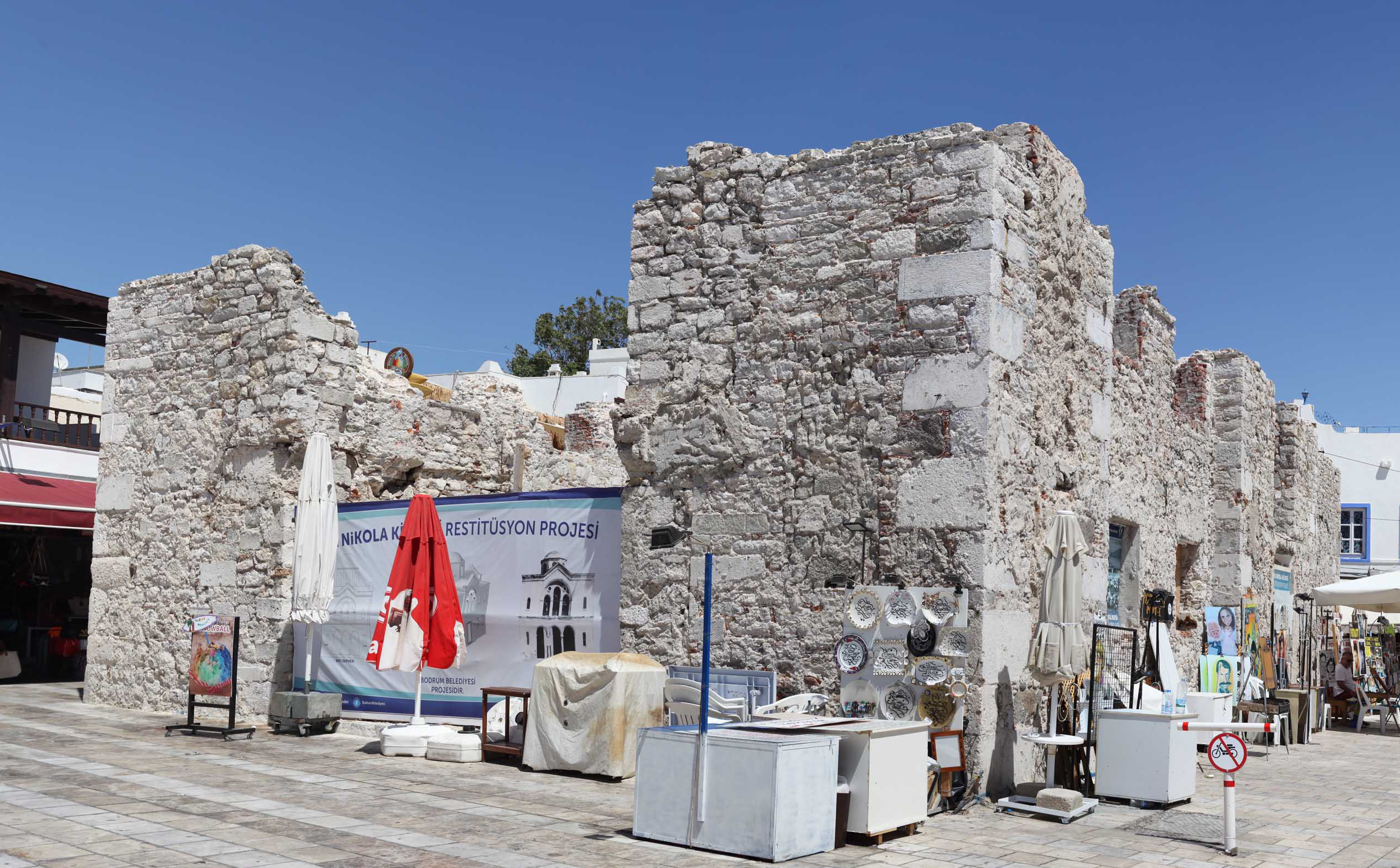 Aya Nikola Kilisesi BODRUM